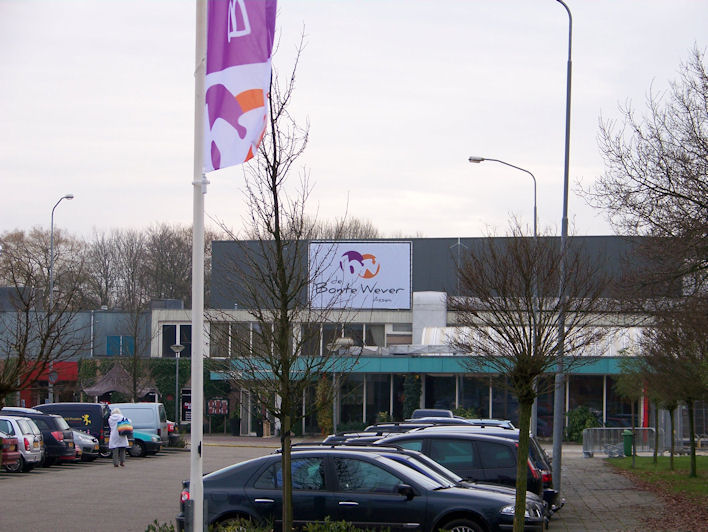 De Bonte Wever in Assen